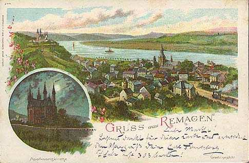 Farbpostkarte von Remagen, 1902